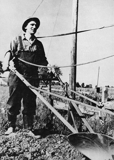 Bertil Boo (1914-1996)